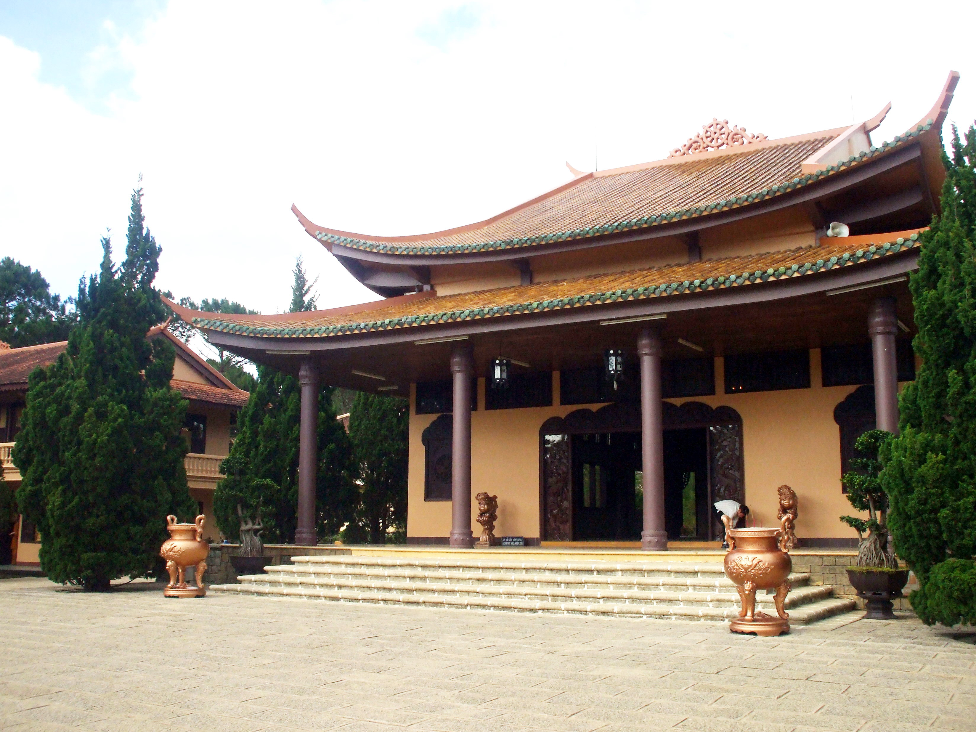 Chính điện thiền viện Trúc Lâm ở Đà Lạt (Lâm Đồng, Việt Nam).